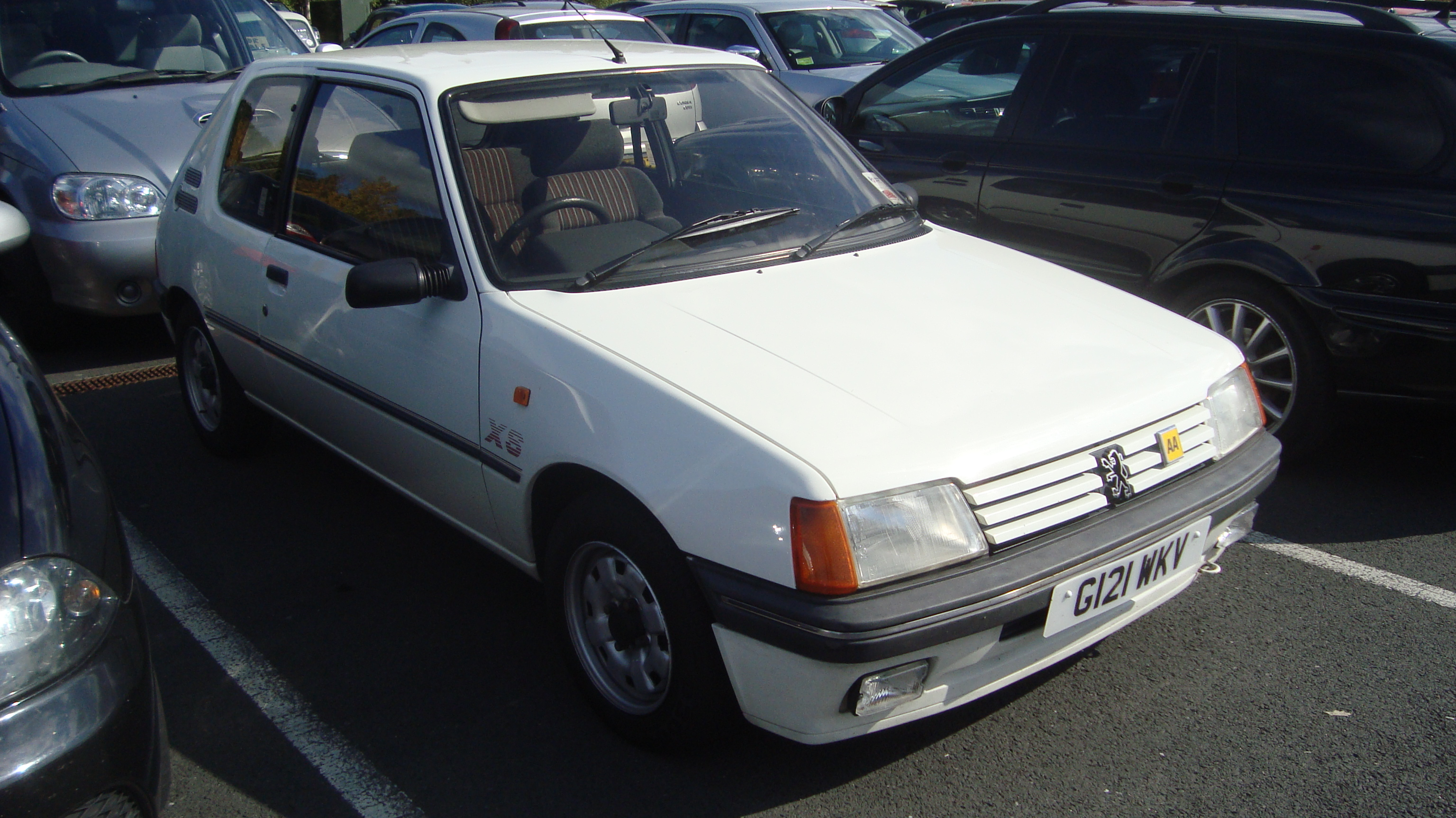 1989 Peugeot 205 1.4 XS